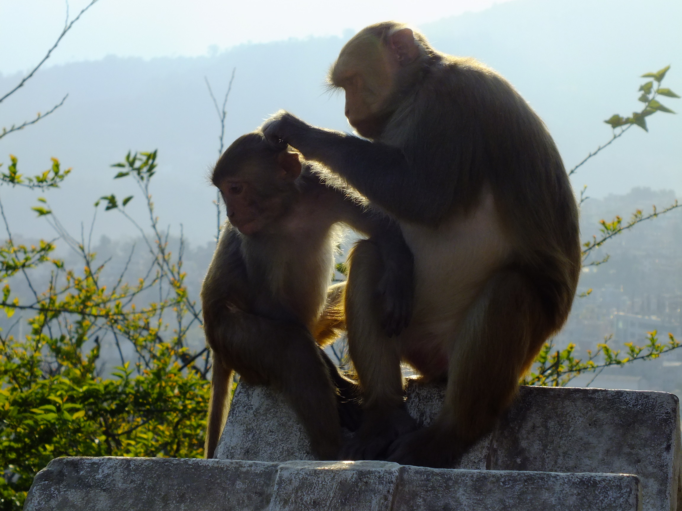 2015-03-08 Swayambhunath,Katmandu,Nepal,சுயம்புநாதர் கோயில்,スワヤンブナート